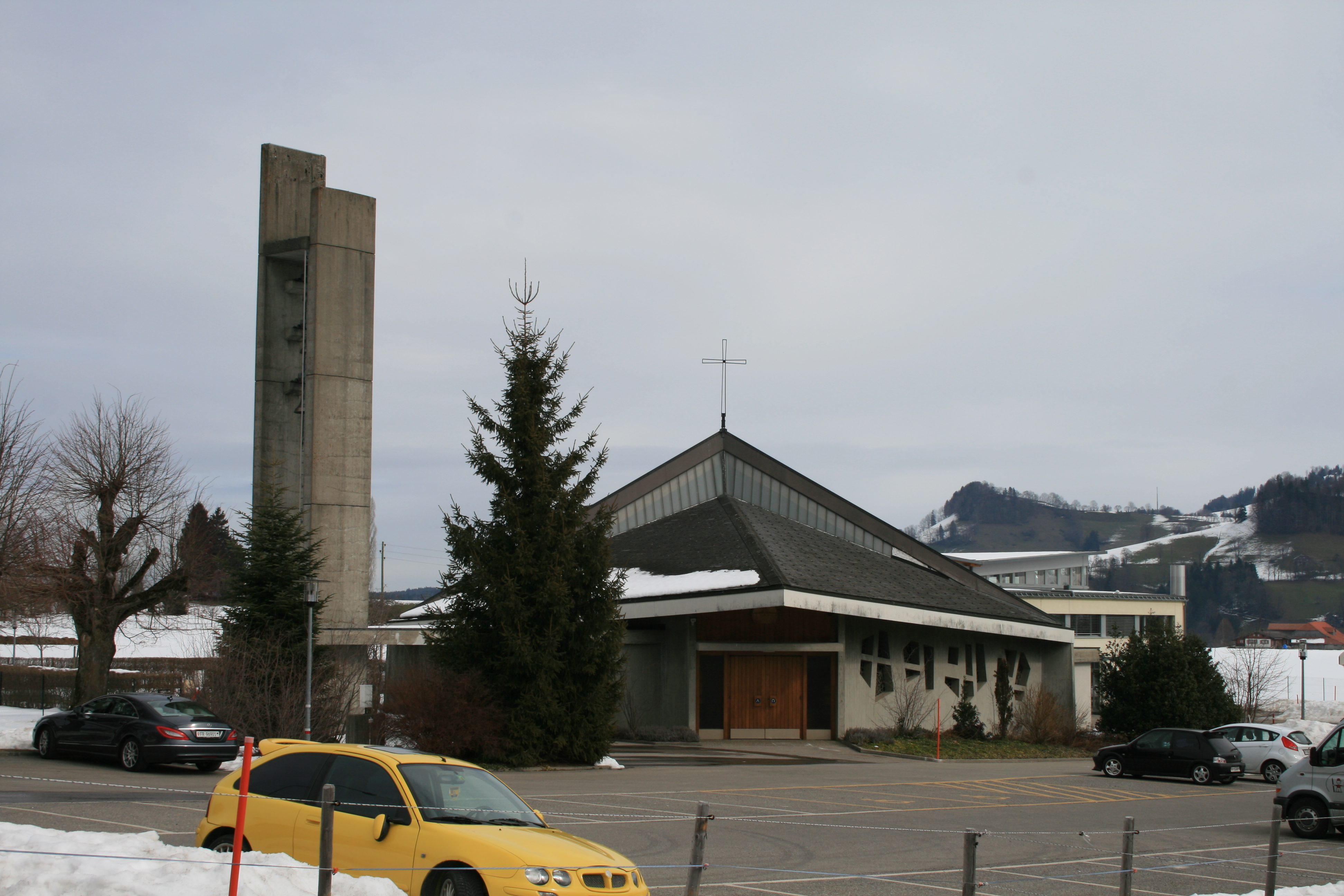 Kath. Kirche, Brünisried